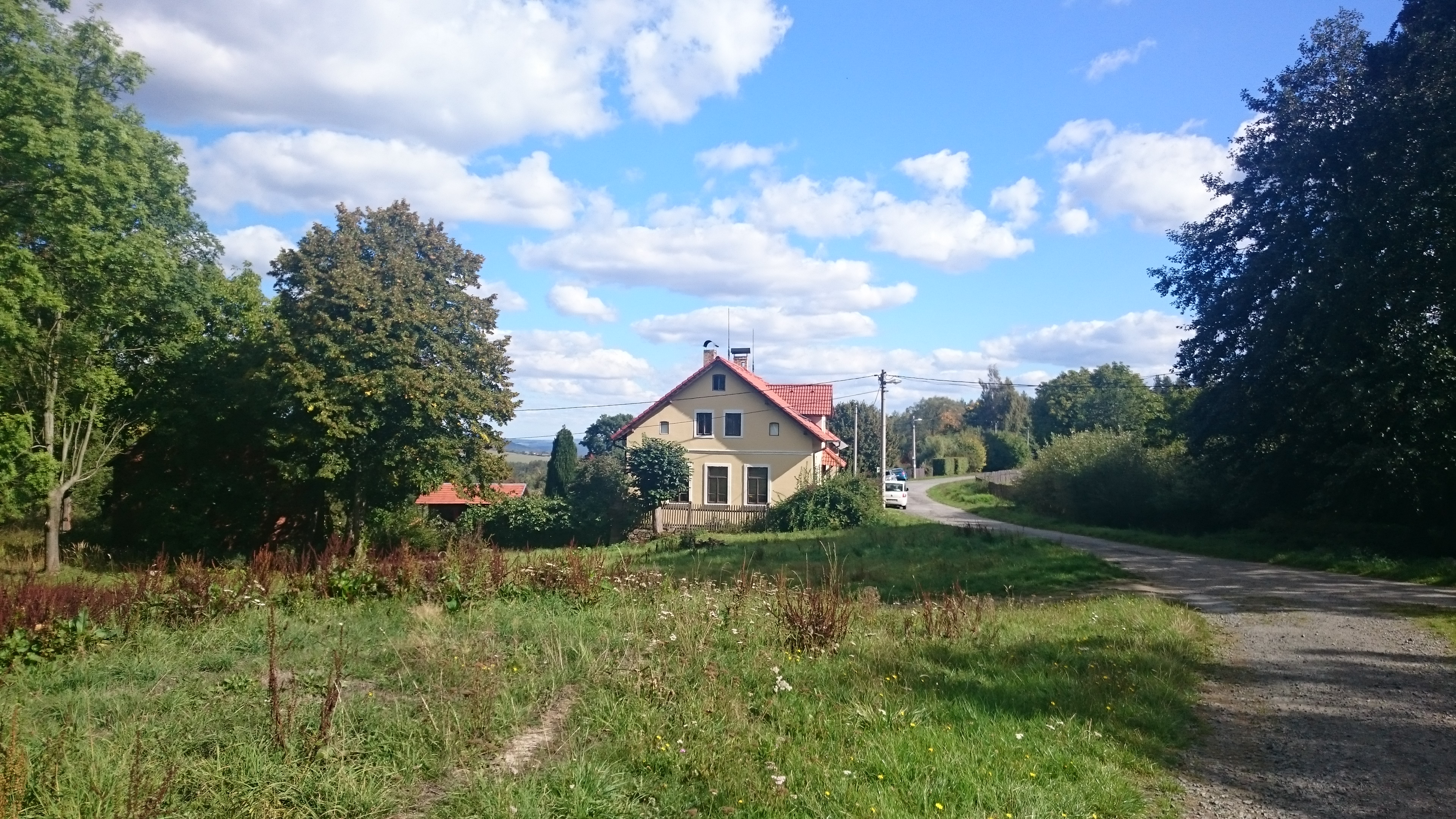 Dům v Kamenné Hoře. Okres Plzeň-sever, Česká republika.